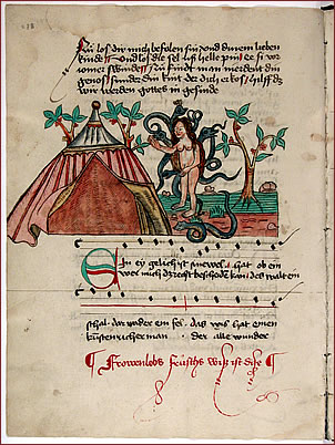 Donaueschinger Liederhandschrift, Oberrhein, Ende 15. Jh. Aufgeschlagen auf S. 278: Frau Welt weist auf das verführerisch aufgeschlagene Zelt. Verderbtheit und Gefahren, die von ihr ausgehen, werden durch Schlangen, die aus ihrem Rücken kommen, und giftige Flora (Vogelbeerbäume?, Pilze) symbolisiert; Papierhandschrift, 322 S., Size H 28,5 cm x B 21,5 cm Manuscript in the Badische Landesbibliothek, Karlsruhe, Germany Cod. Donaueschingen 120